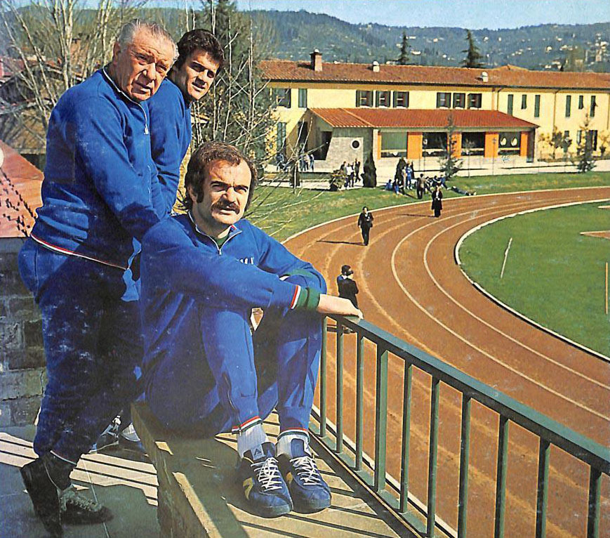 Coverciano (Firenze), 1974. Alessandro "Sandro" Mazzola (in primo piano), il commissario tecnico Ferruccio Valcareggi (in secondo piano) e Fabio Capello (sullo sfondo) all'interno del Centro Tecnico Federale della FIGC (Federazione Italiana Giuoco Calcio), in occasione di un ritiro della nazionale italiana di calcio.